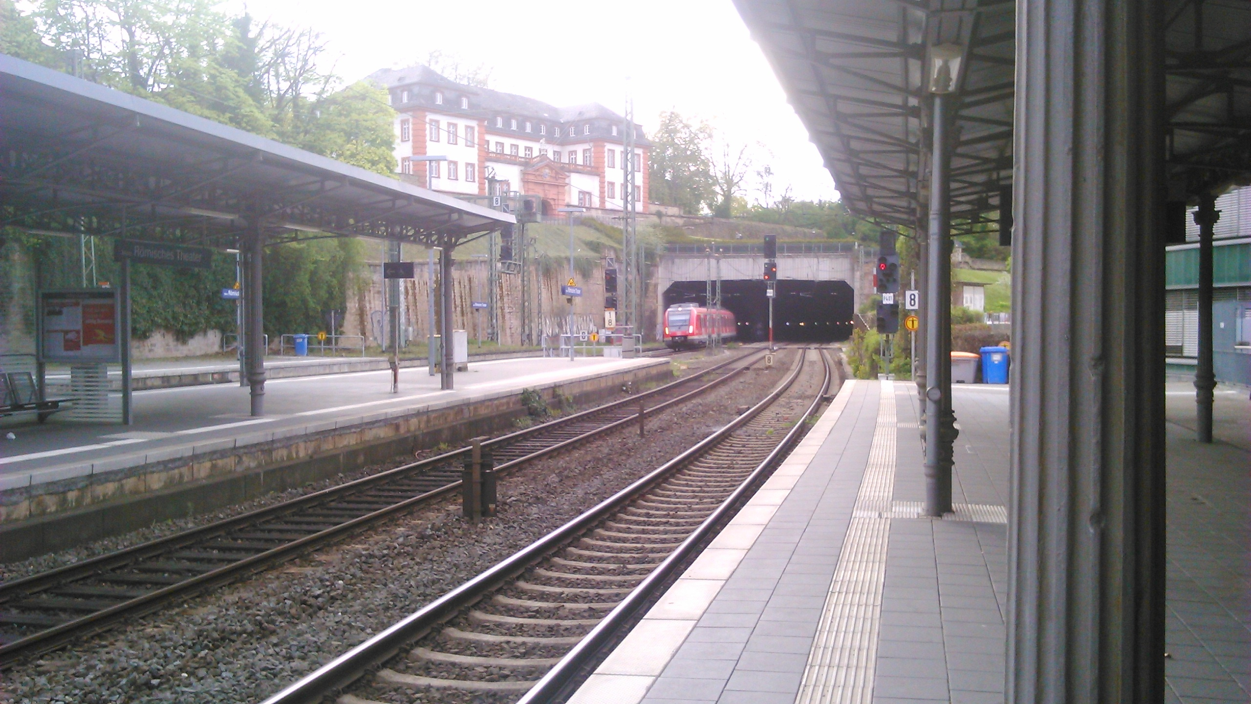 Eine S-Bahn der Linie S8 Richtung Offenbach fährt aus dem Mainzer Eisenbahntunnel in den Bahnhof Römisches Theater ein.